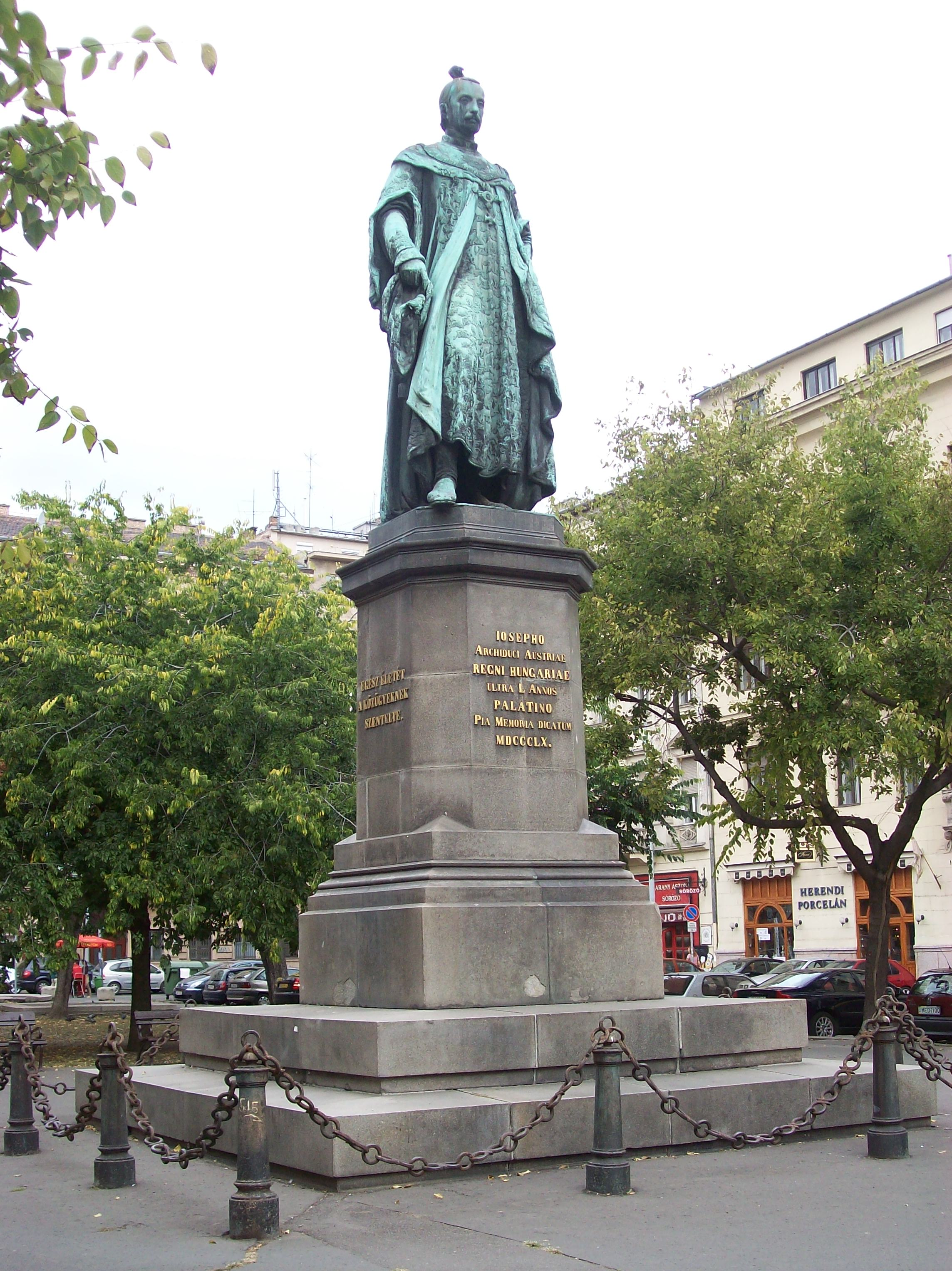 József nádor szobra Budapest V. kerületében a József nádor téren